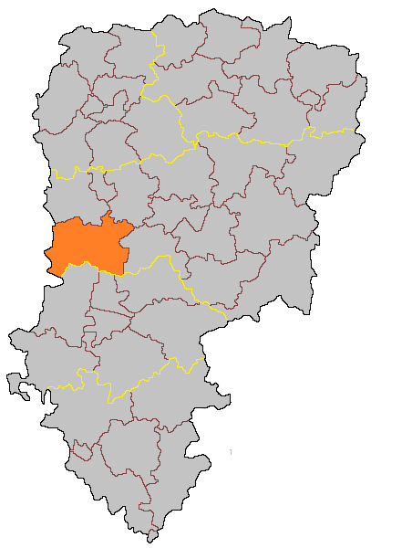 Кантон Куси-ле-Шато-Офрик на карте департамента Эна